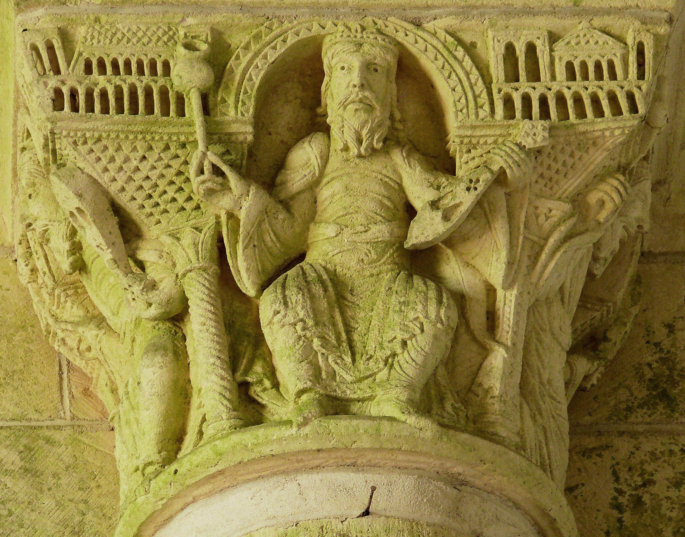 Gargilesse-Dampierre - Eglise Notre-Dame - Croisée du transept - Chapiteau représentant un vieillard de l'Apocalypse